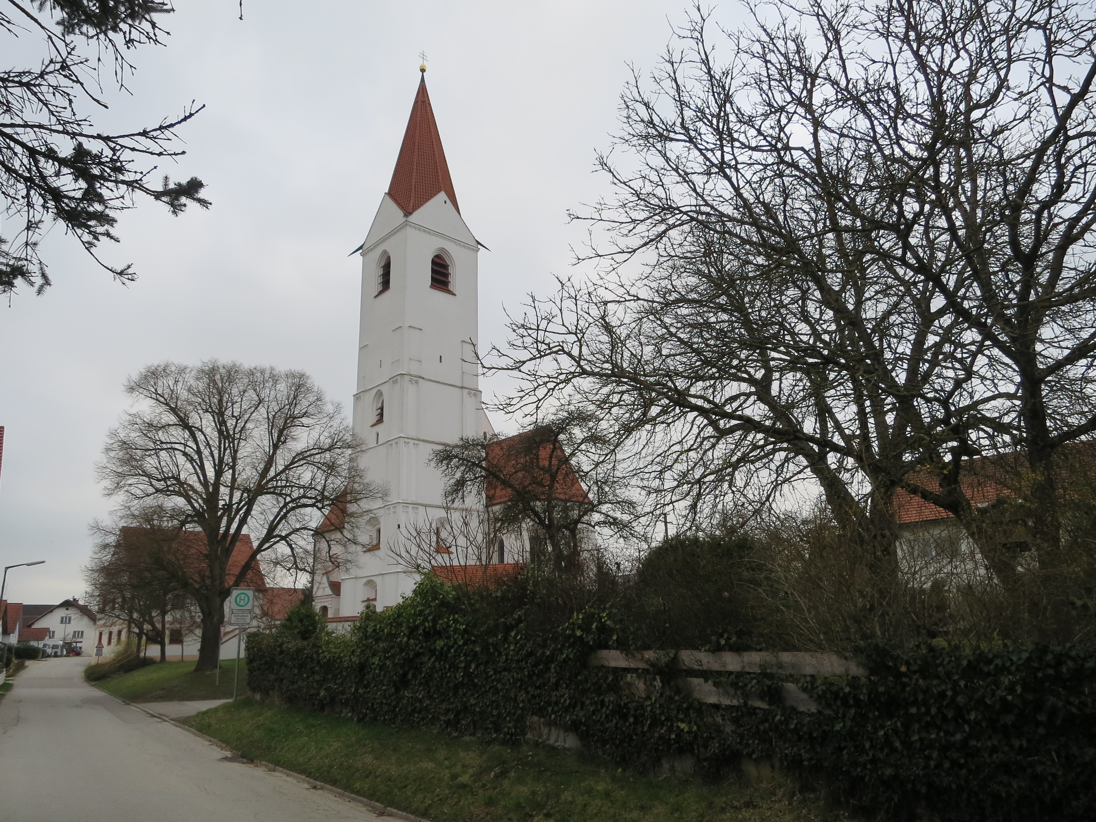 Eine spätgotische Saalkirche in einem kleinen Ort